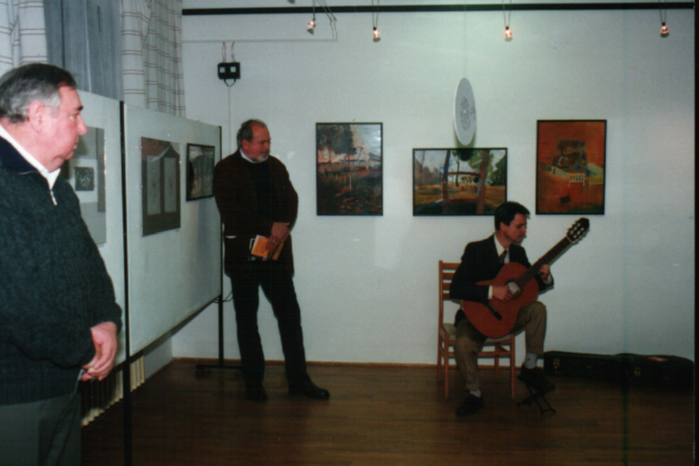 Hamza Studio-Korlátok, Jászberény